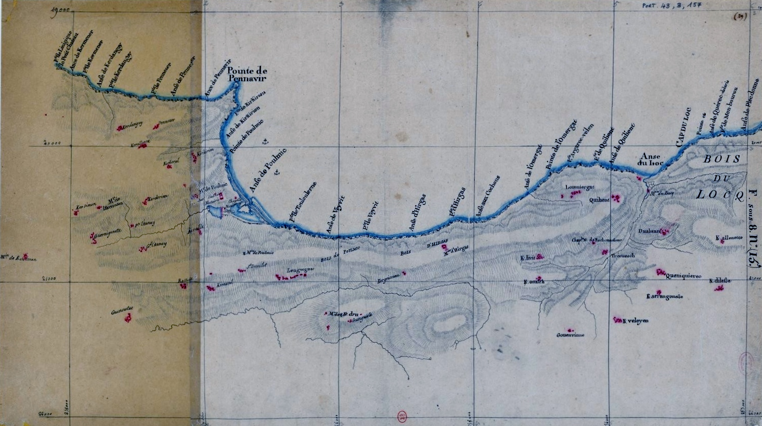 Carte du Bois du Loc'h et de l'anse de Poulmic datant de la période 1771-1785